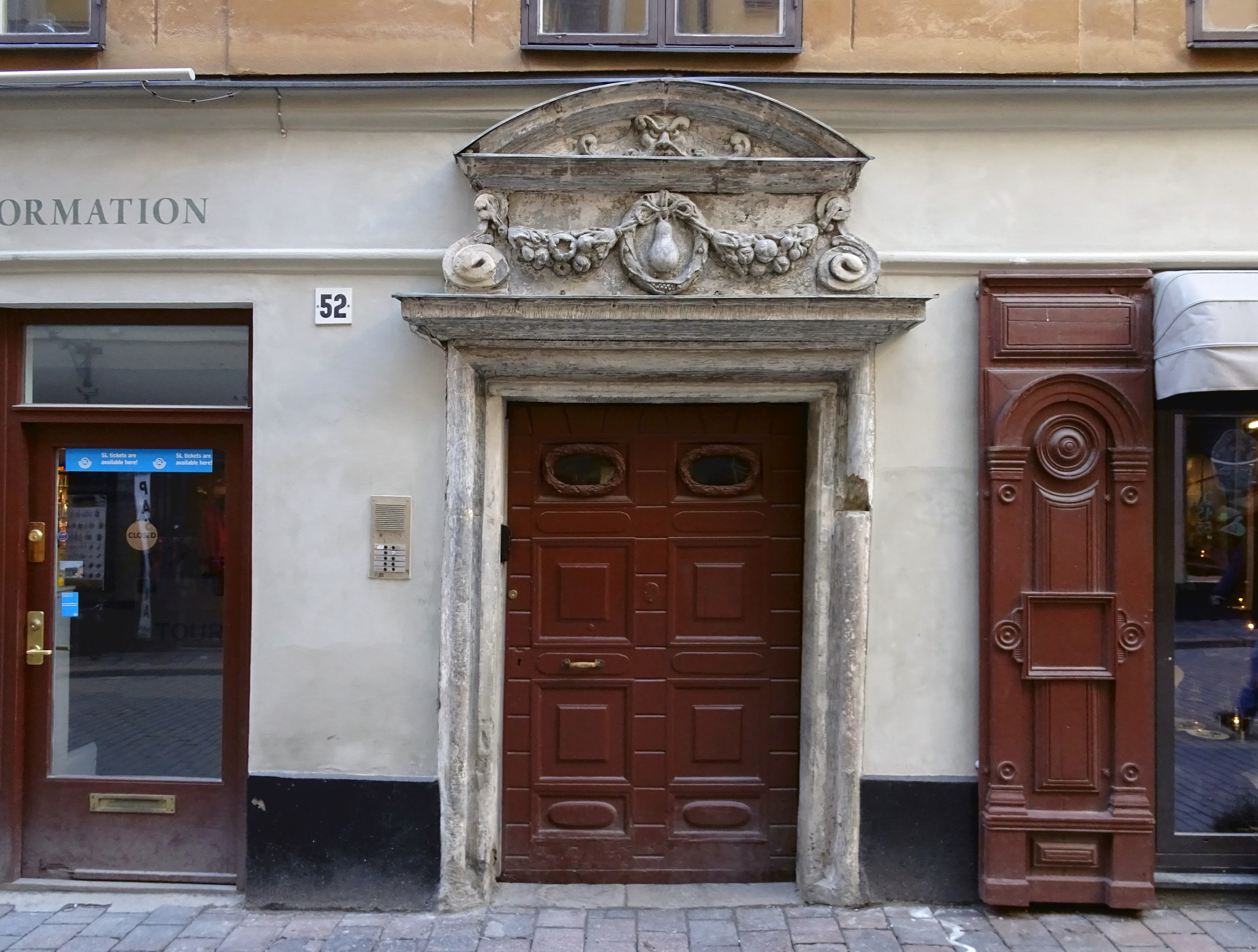 Sidenhuset Päron, Västerlånggatan 52